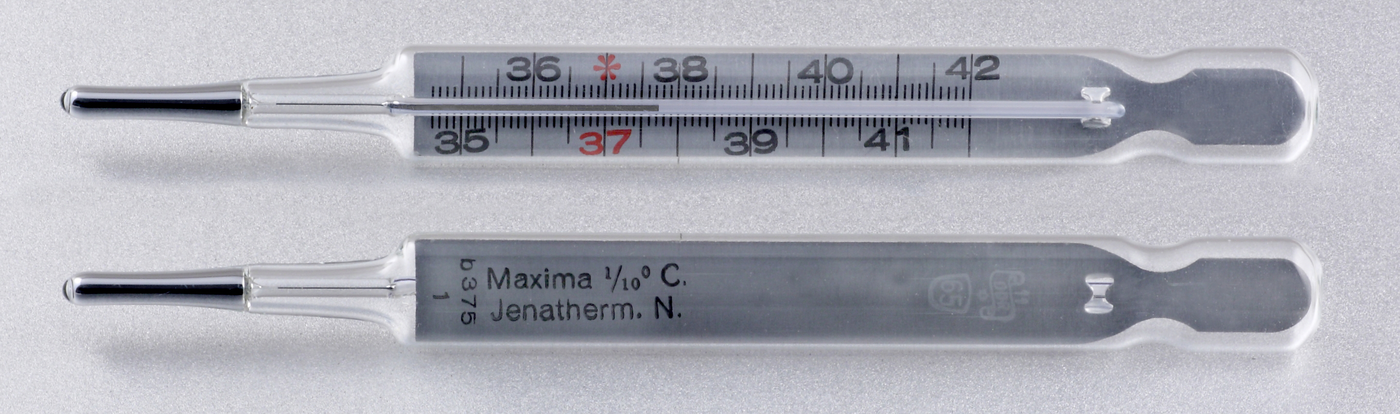 Glasfieberthermometer mit Quecksilber-Füllung (Montage aus 2 Einzelbildern)